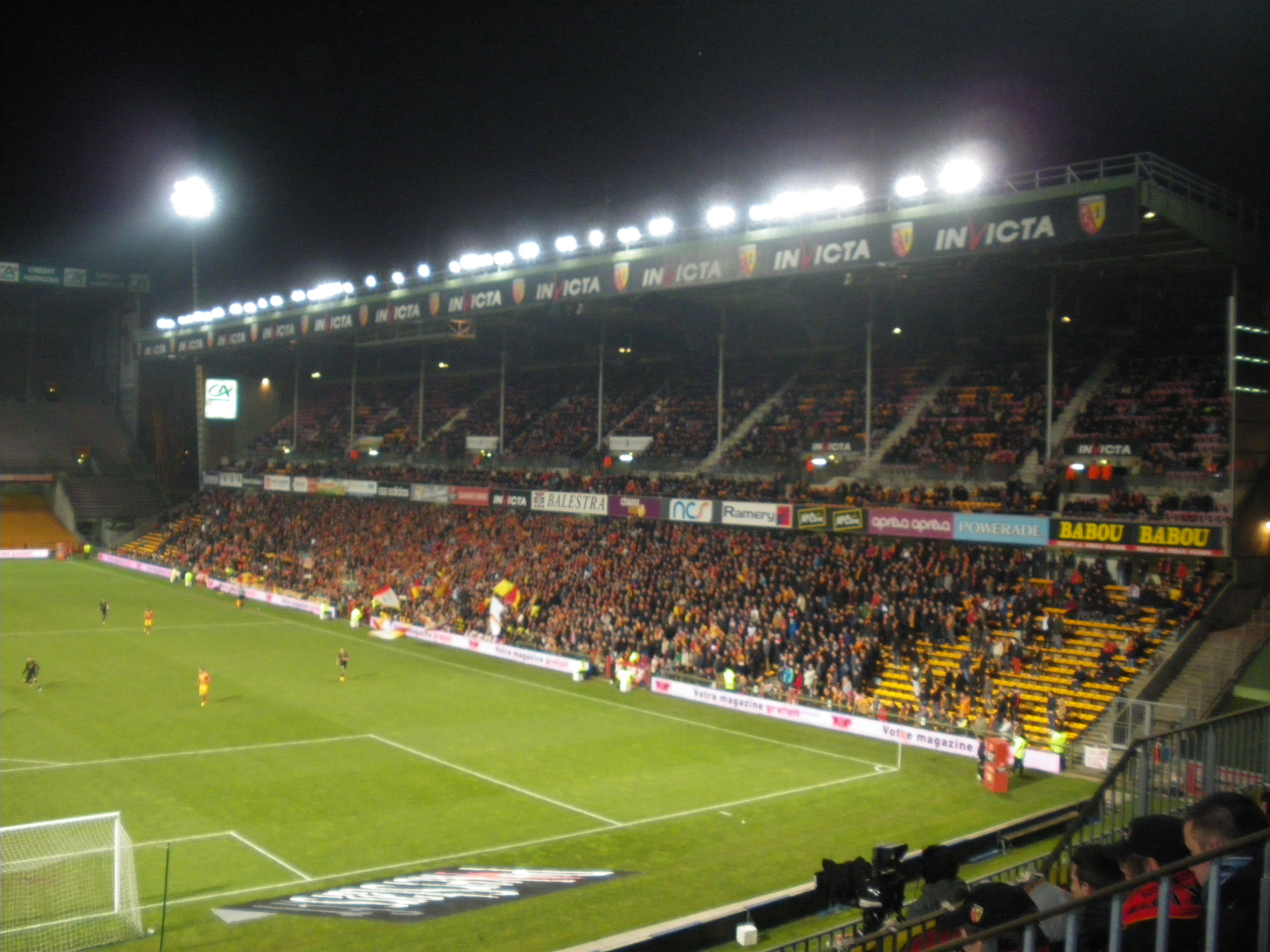 Vue des supporters des tribunes Marek et Xercès lors du match Lens-Nantes du 4 mars 2013.